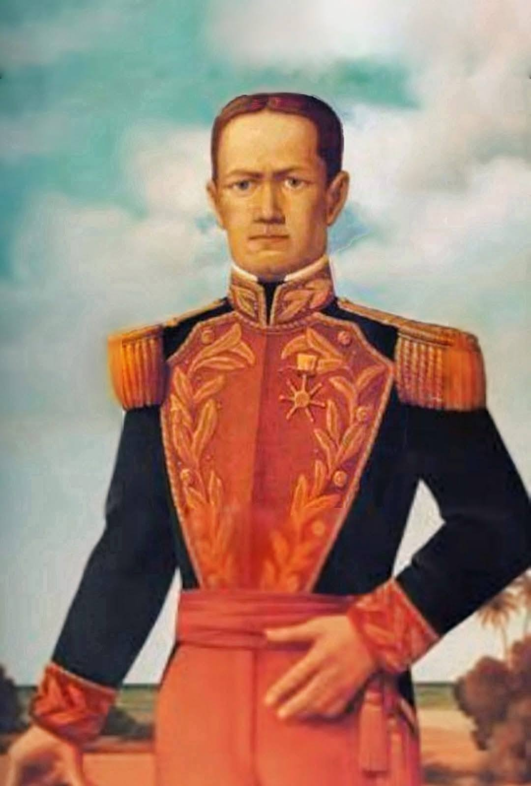 Depicted person: José Inácio de Abreu e Lima